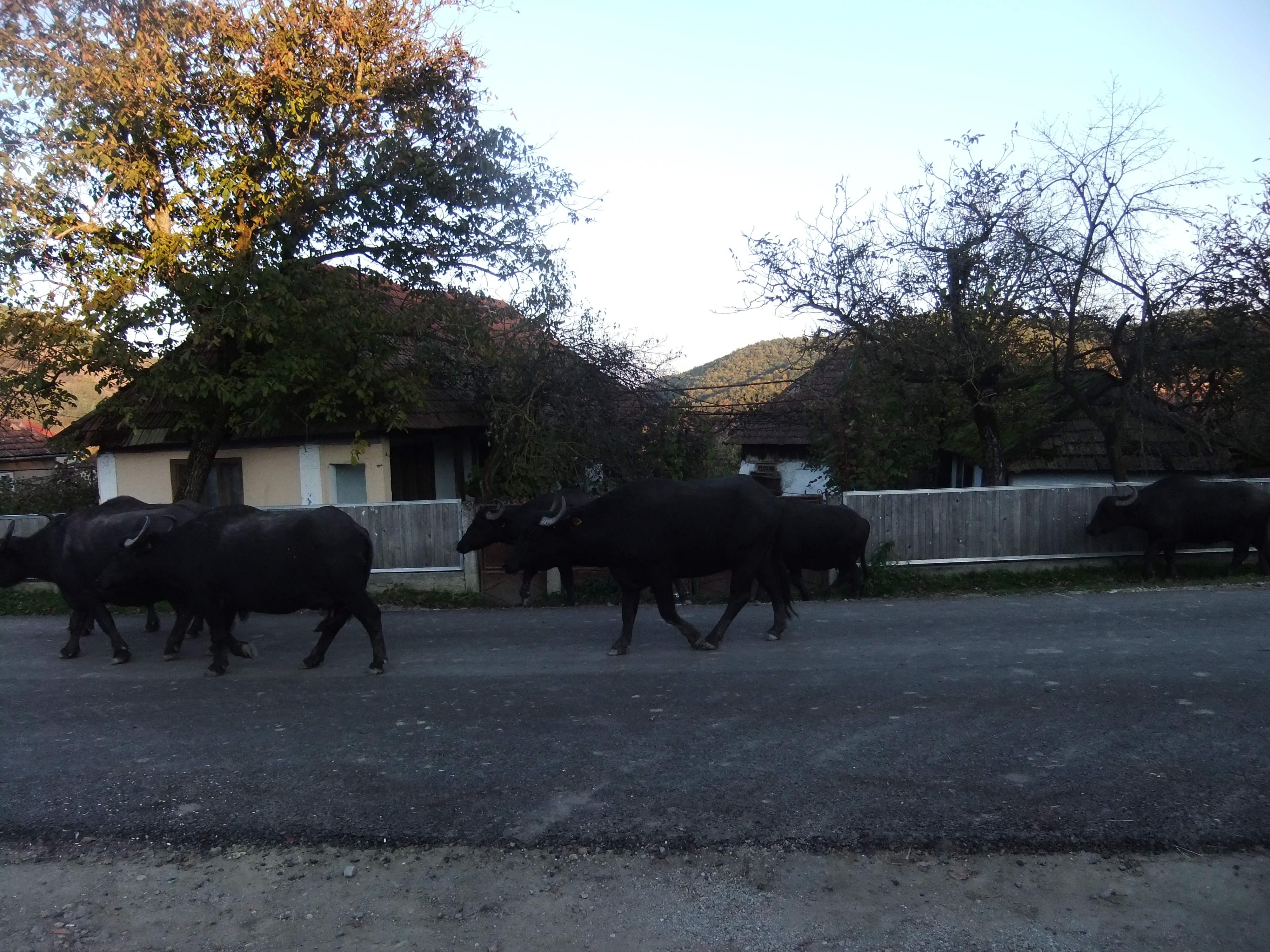 Ciurda - Bivoli